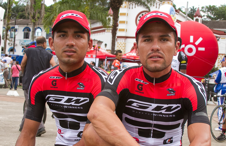 Les frères Tamayo (Sebastián à gauche et Diego à droite) avant le départ de la première étape du Clásico RCN 2013.